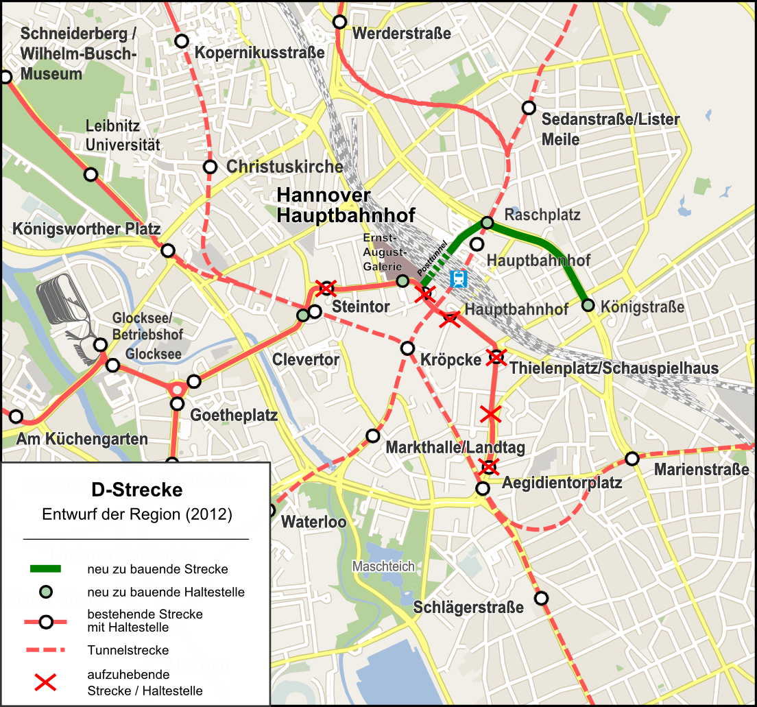 Ausbau D-Strecke Innenstadt: Entwurf der Region von 2012 mit Endhaltestelle am Platz der Kaufleute.